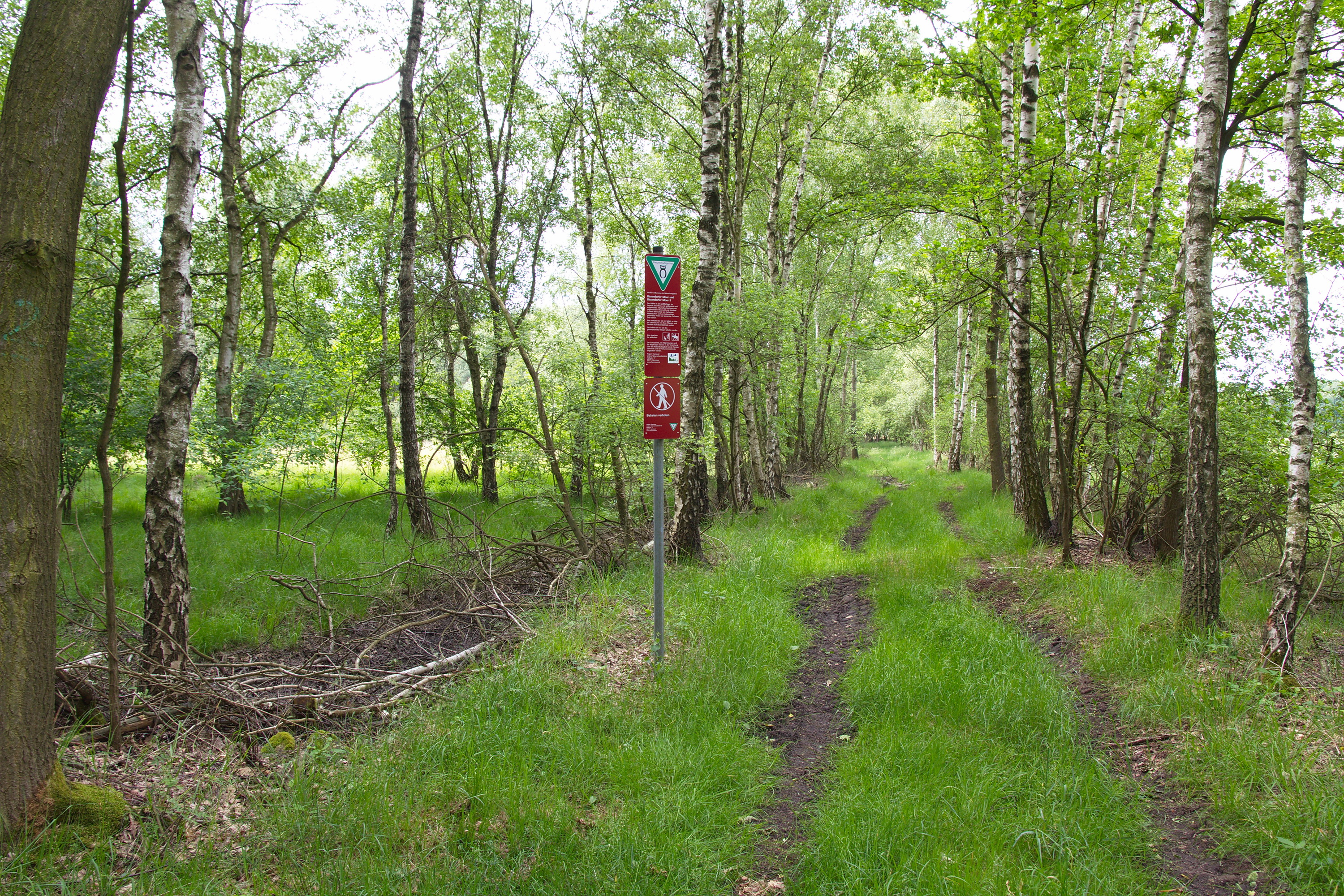 Zugang zum Bissendorfer Moor bei Wiechendorf (Wedemark), Niedersachsen, Deutschland.